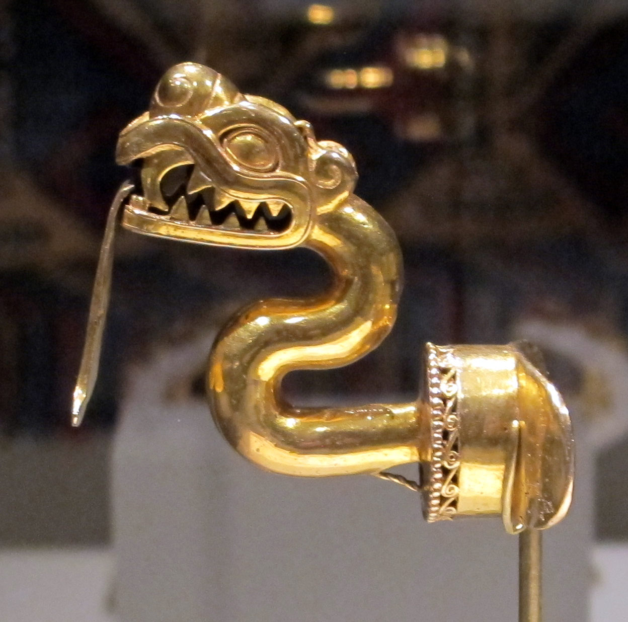 Pre-Columbian jewellery in the Metropolitan Museum of Art